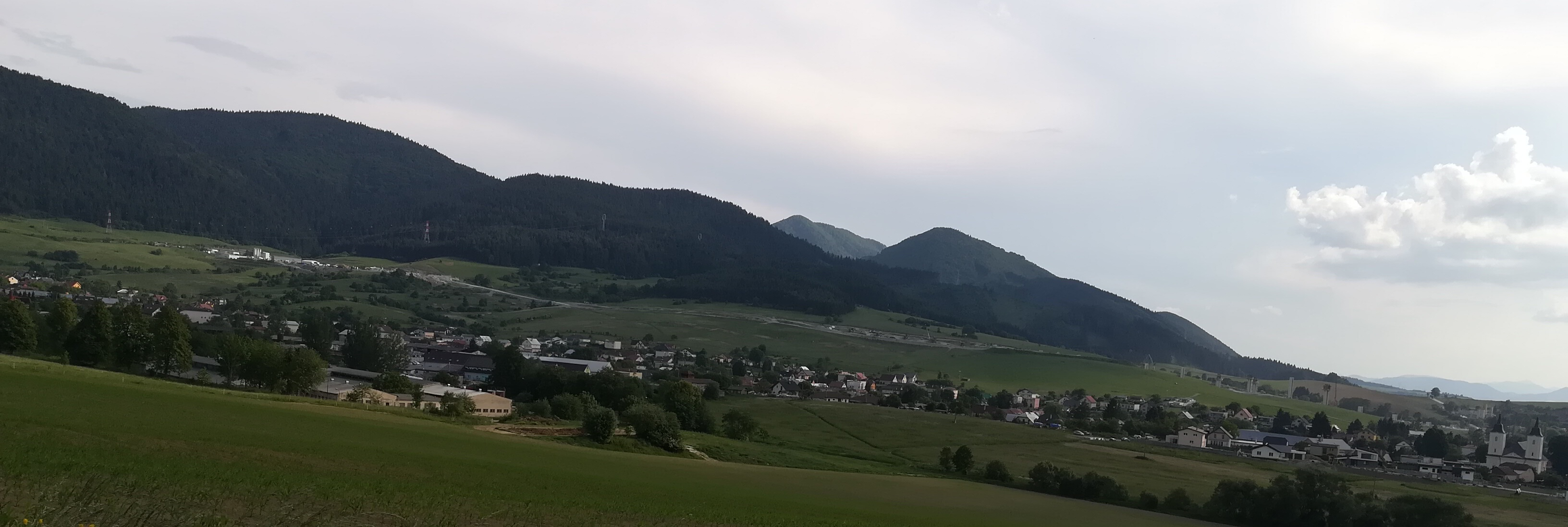 D1 nad Višňovým pred vstupom do tunela